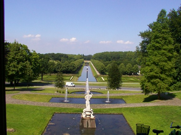 zelf gemaakt